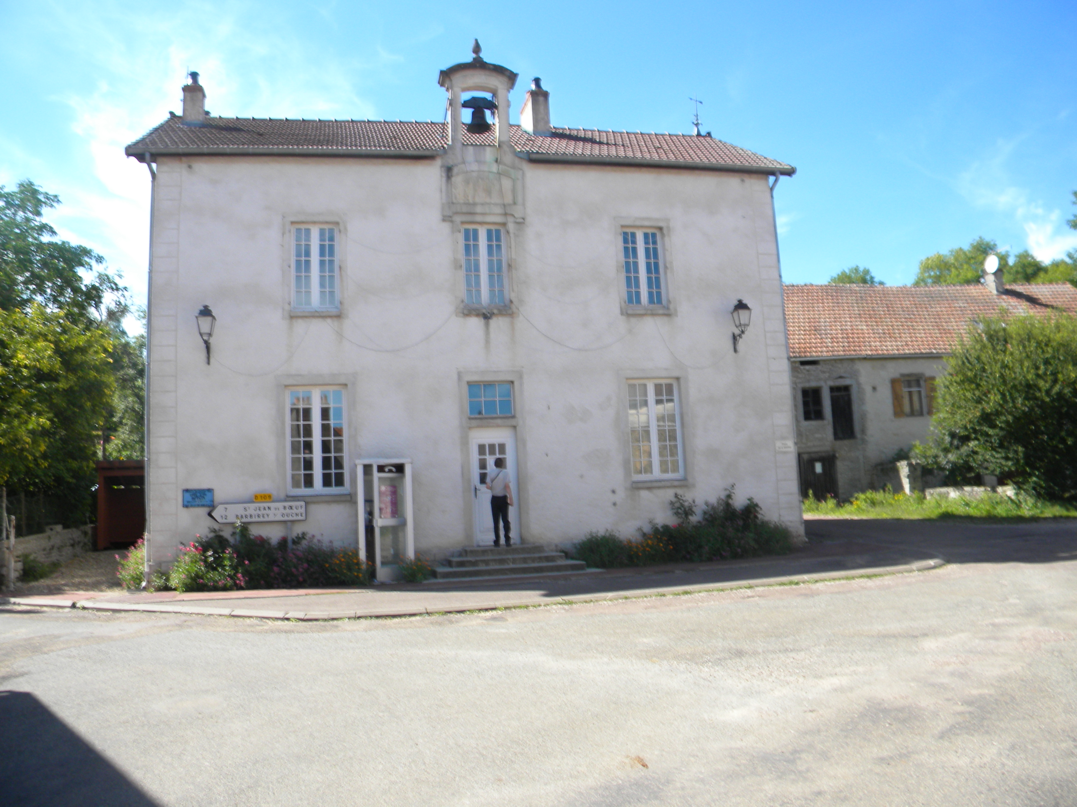 Mairie de Détain-et-Bruant